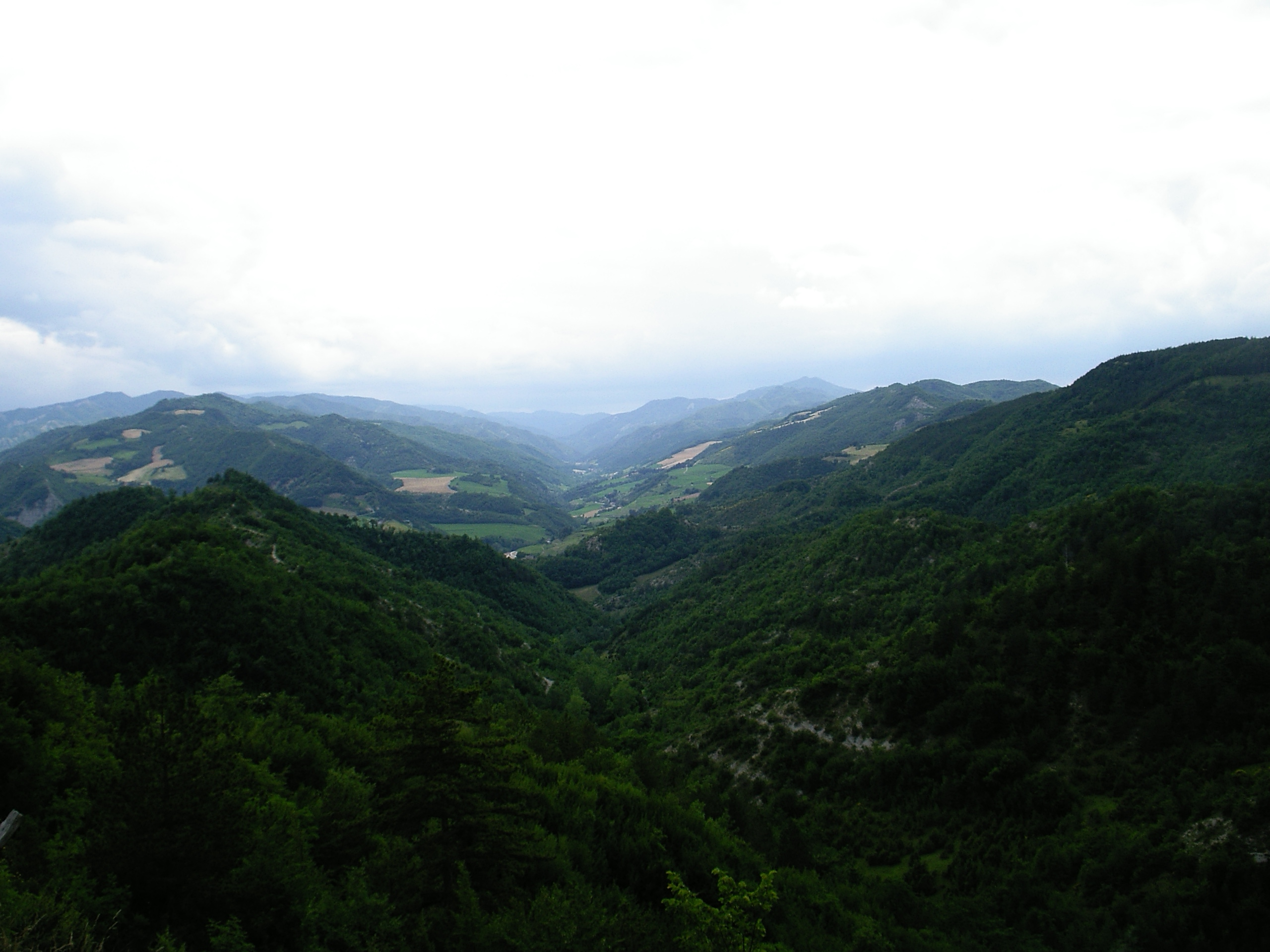 Perkele, propria, Appennino forlivese, libero